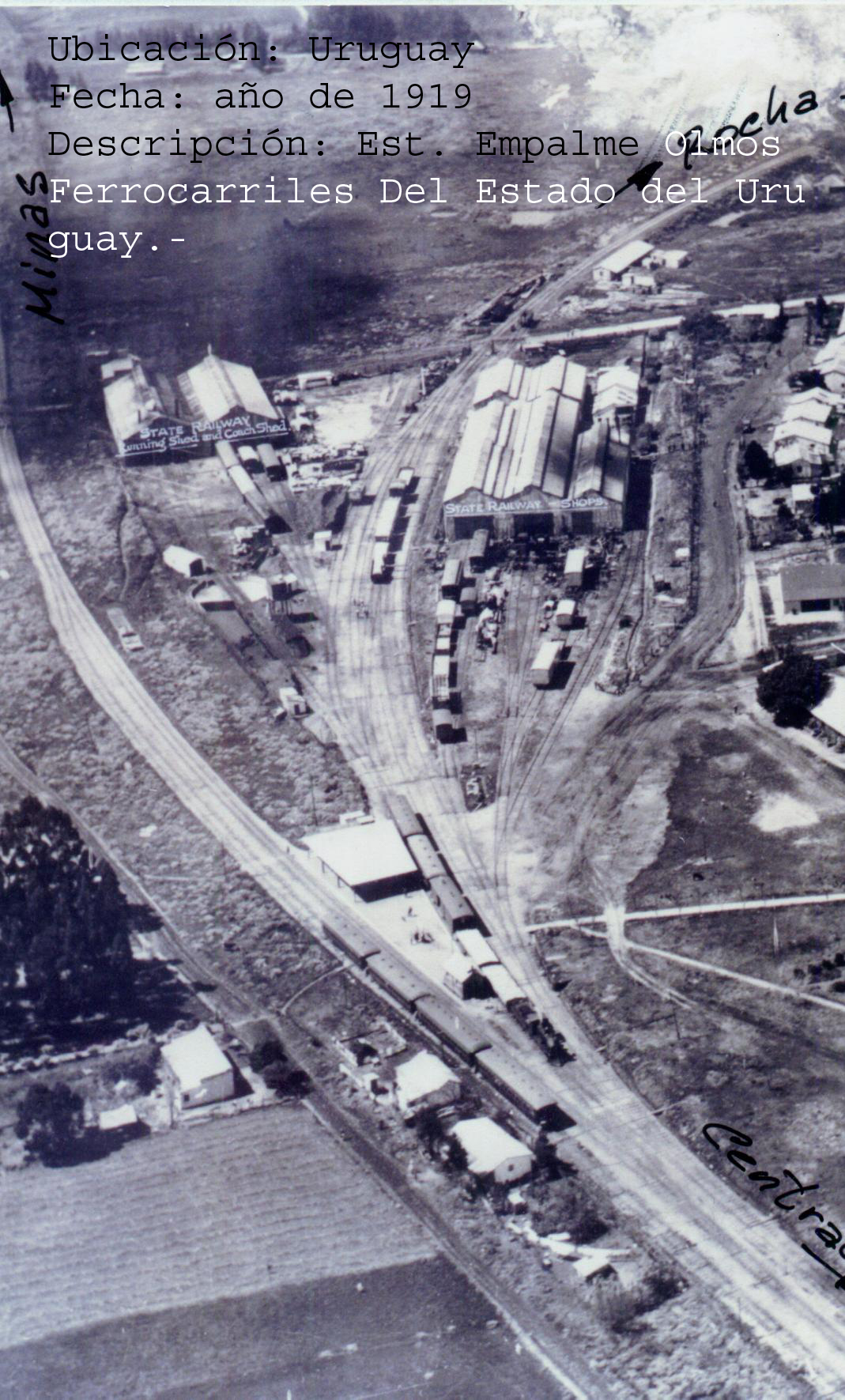 Foto aérea de la Estación Sudriers en 1920